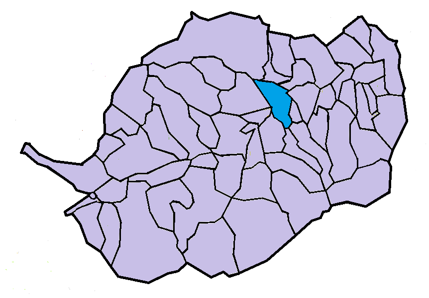 Adaptació del mapa del Conflent a la nova adscripció comarcal aprovada el 2007 (Nomenclàtor toponímic de la Catalunya del Nord)